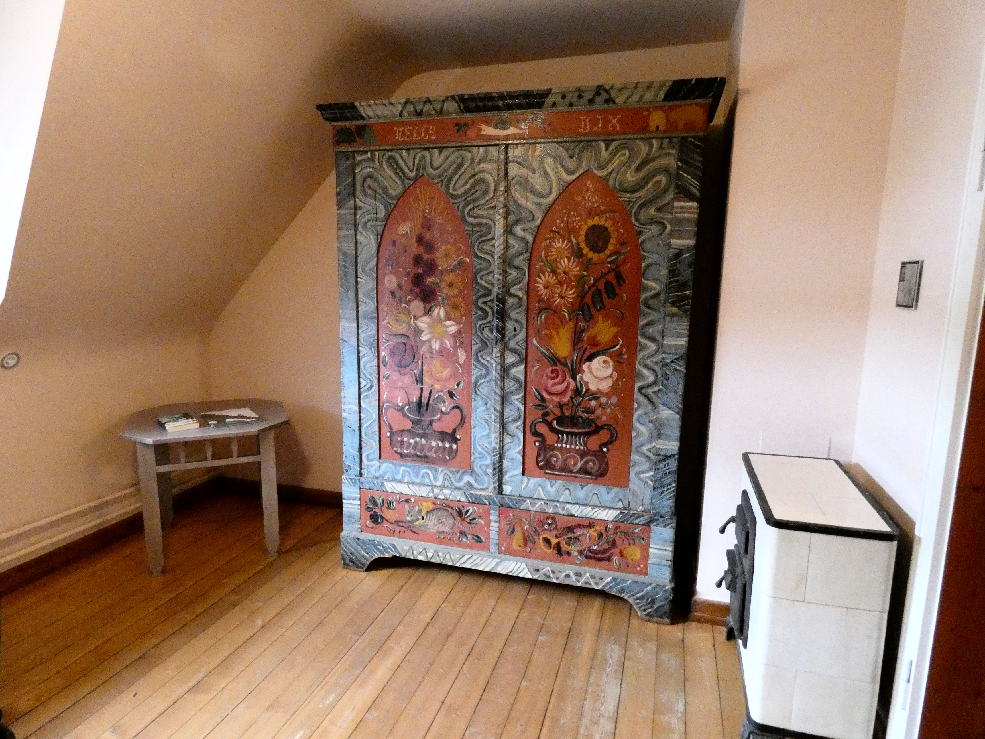 Wohnhaus von Otto Dix in Hemmenhofen, heute Museum Haus Dix, Schrank in Nelly Dix' Zimmer, von ihr bemalt